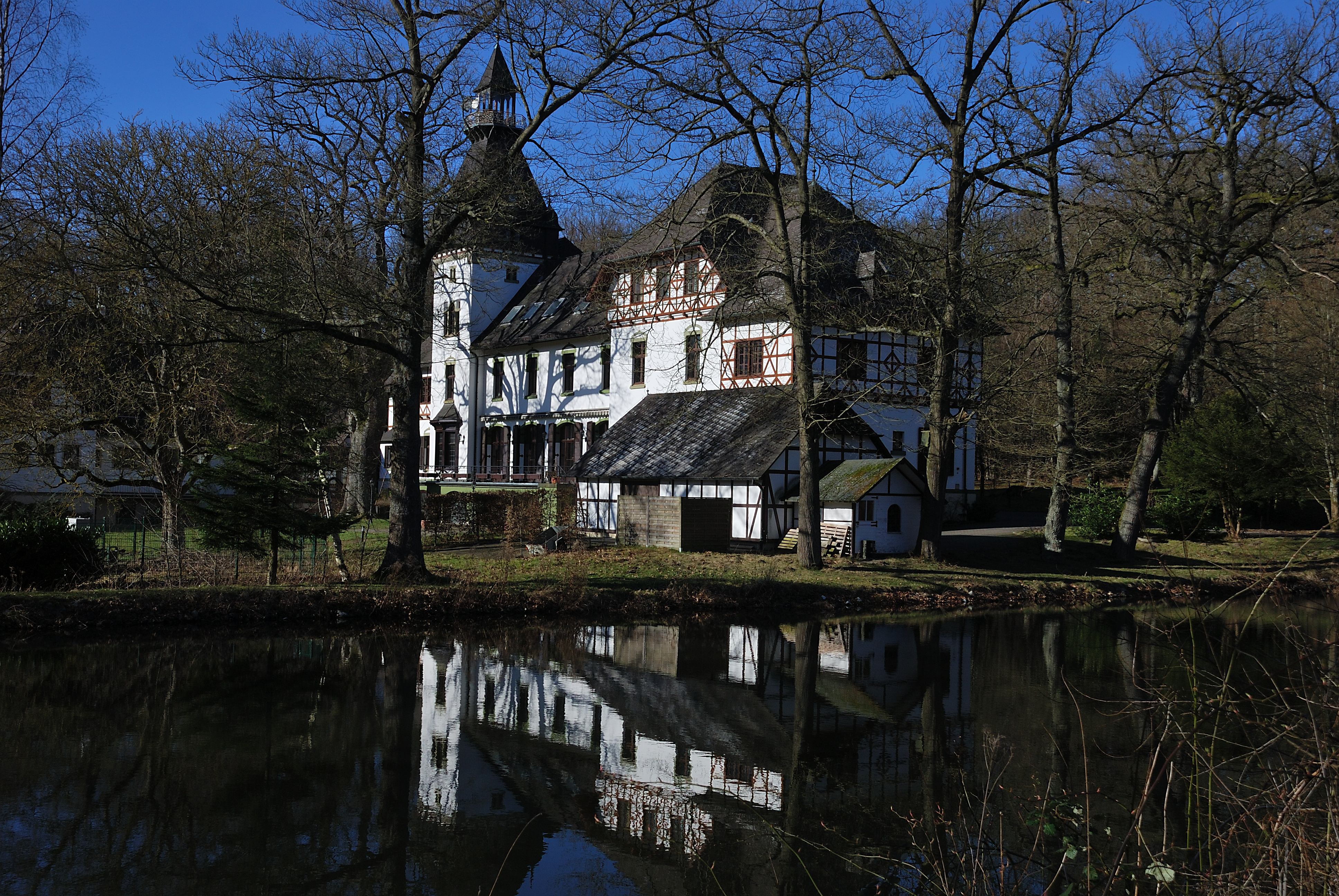 Jagdschloss Sankt Meinolf im Arnsberger Wald bei Neuhaus an der Straße Wilhelmsruh im Ortsteil Stockum der Gemeinde Möhnesee im Kreis Soest in Nordrhein-Westfalen